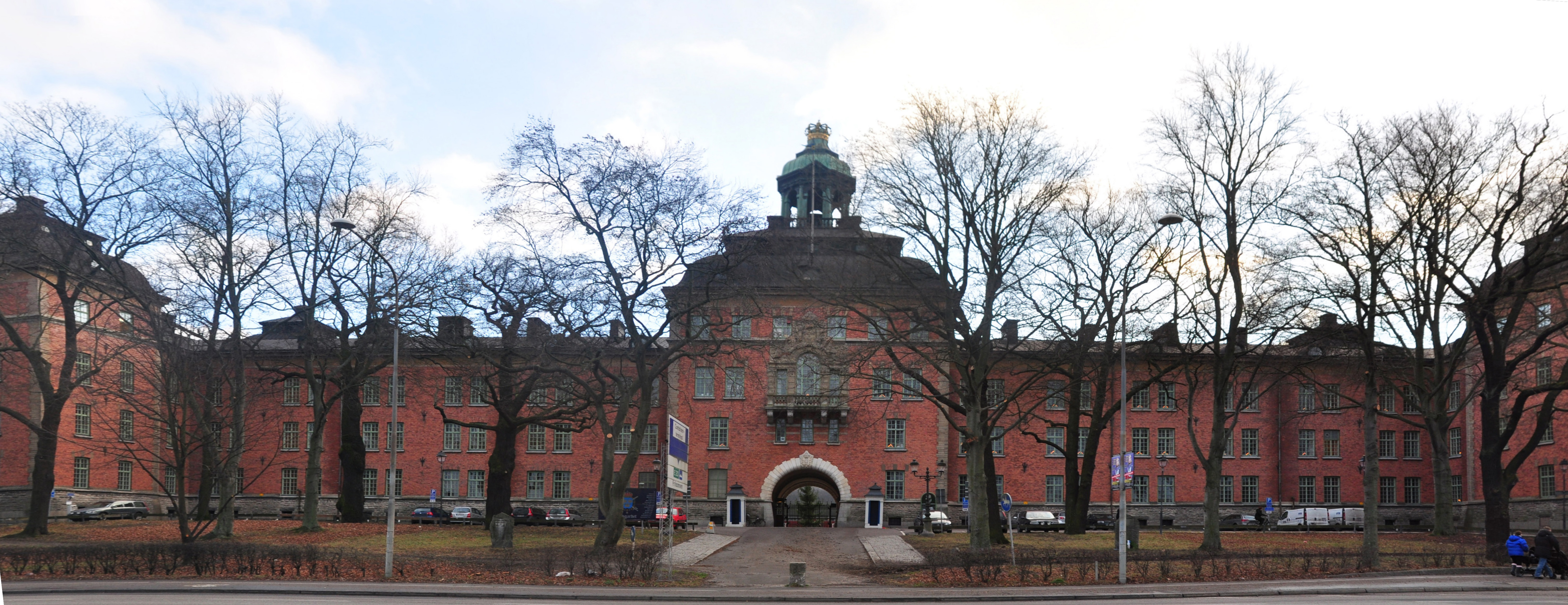 Lidingövägen 28, K1, panorama. Byggnadsår 1897. Arkitekt Erik Josephson